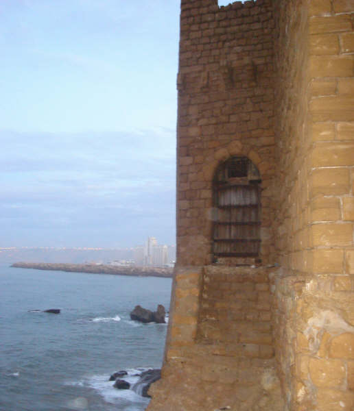 une des tours du château de mer, ancienne forteresse portugaise, bâti pour défendre la ville à l'époque. tout près, il y avait le port de safi ("Mrissa" actuellement), jadis connu par le grand volume des échanges commerciaux effectués à travers.